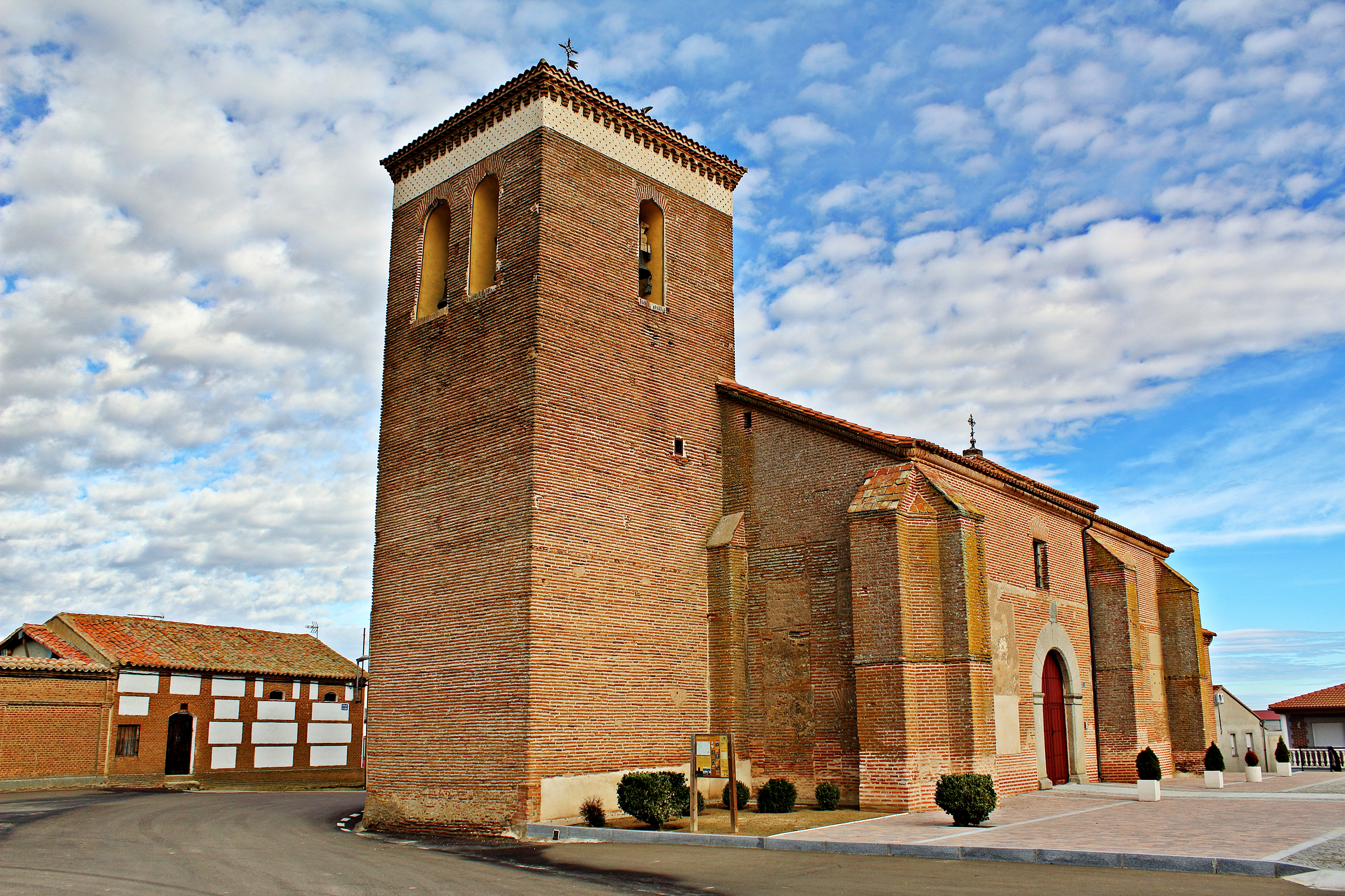 El Campo de Peñaranda municipio de la comarca Tierra de Peñaranda, provincia de Salamanca.